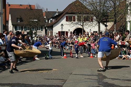 Eierleset in Arlesheim: Kinder, die Eier werfen und zwei Eierfänger